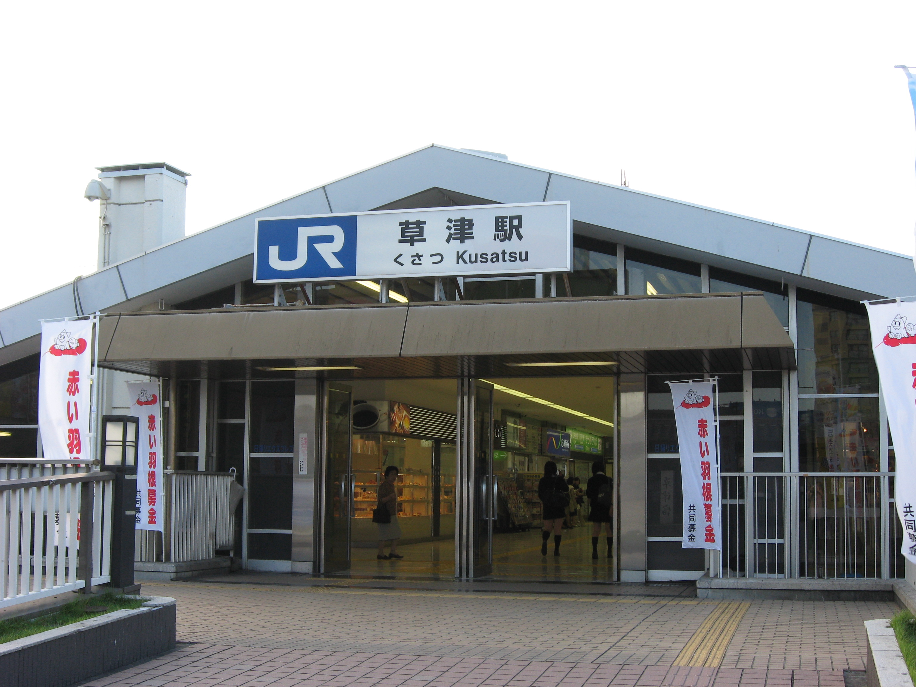 JR Kusatsu Station Front View